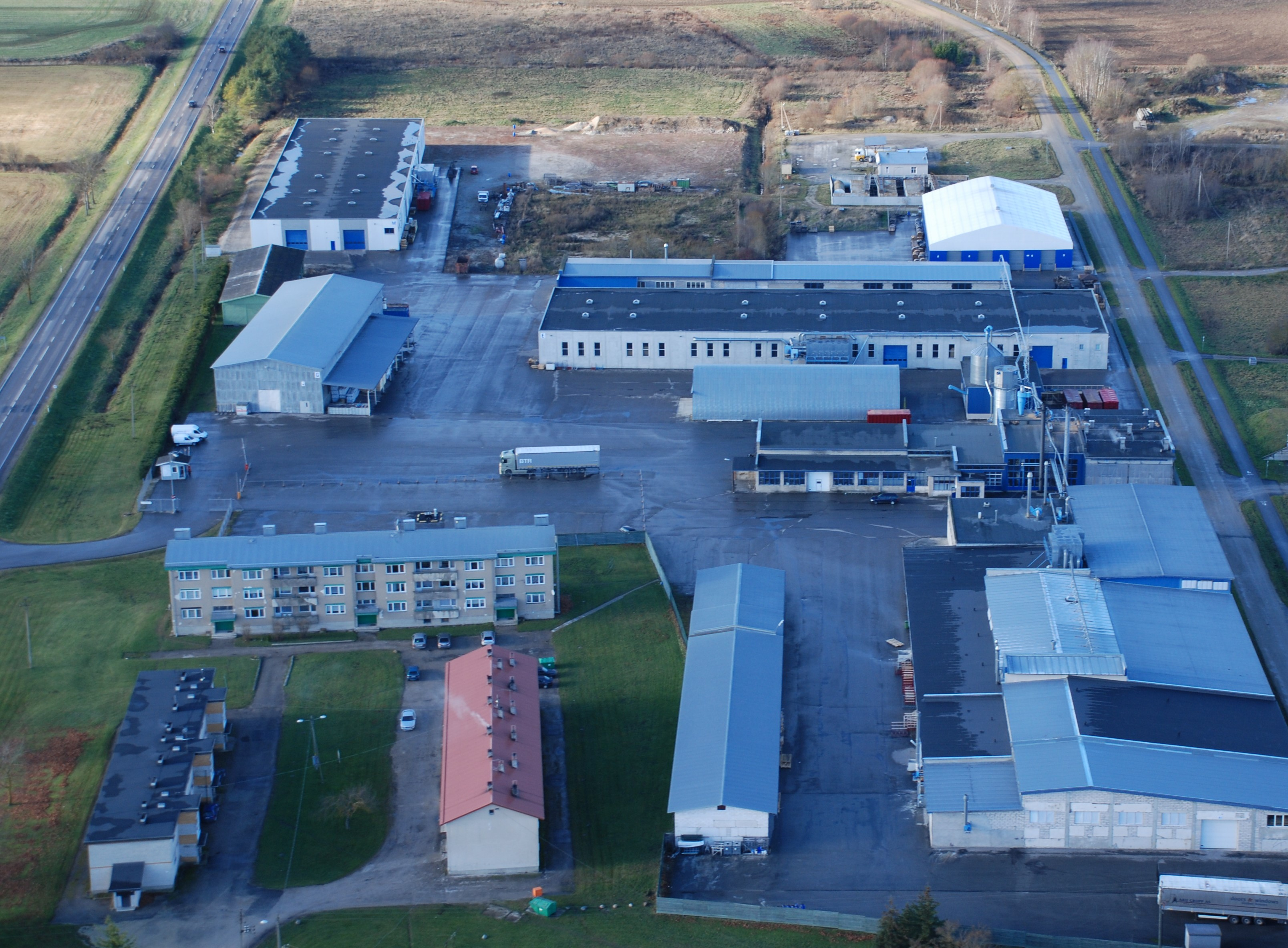 Aru Grupi tootmiskompleks Huljal